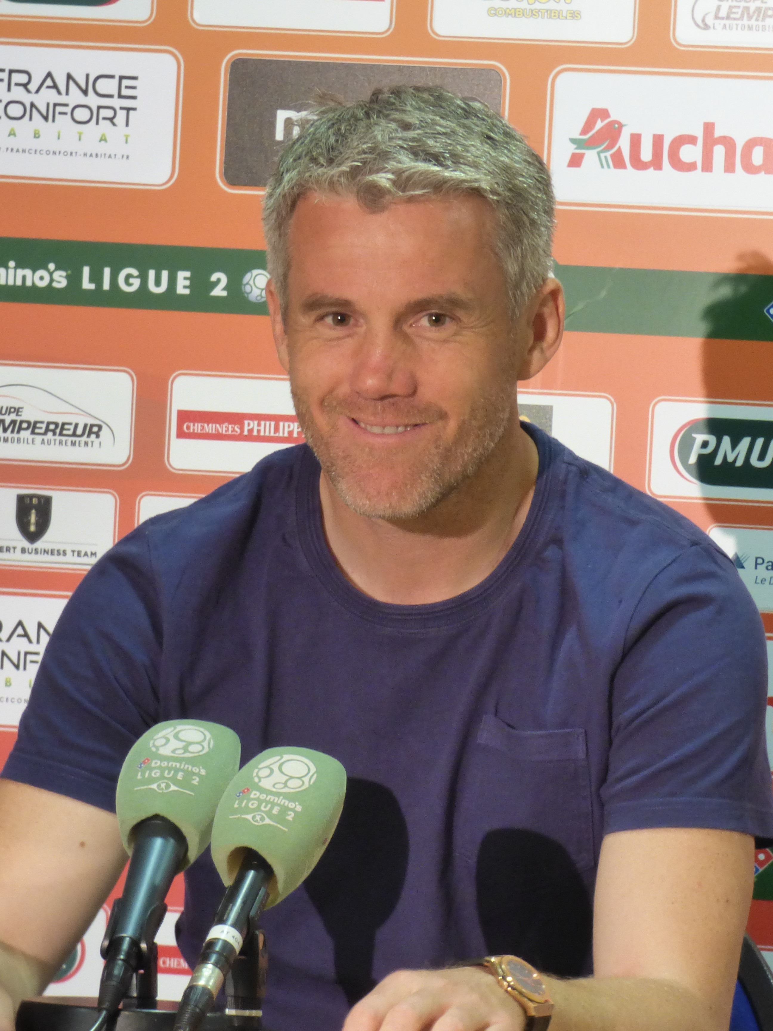 Mickaël Landreau après le match RC Lens / FC Lorient, comptant pour la 34ème journée du championnat de France de Ligue 2 de football 2018-2019, le 23 avril 2019, au Stade Bollaert-Delelis.